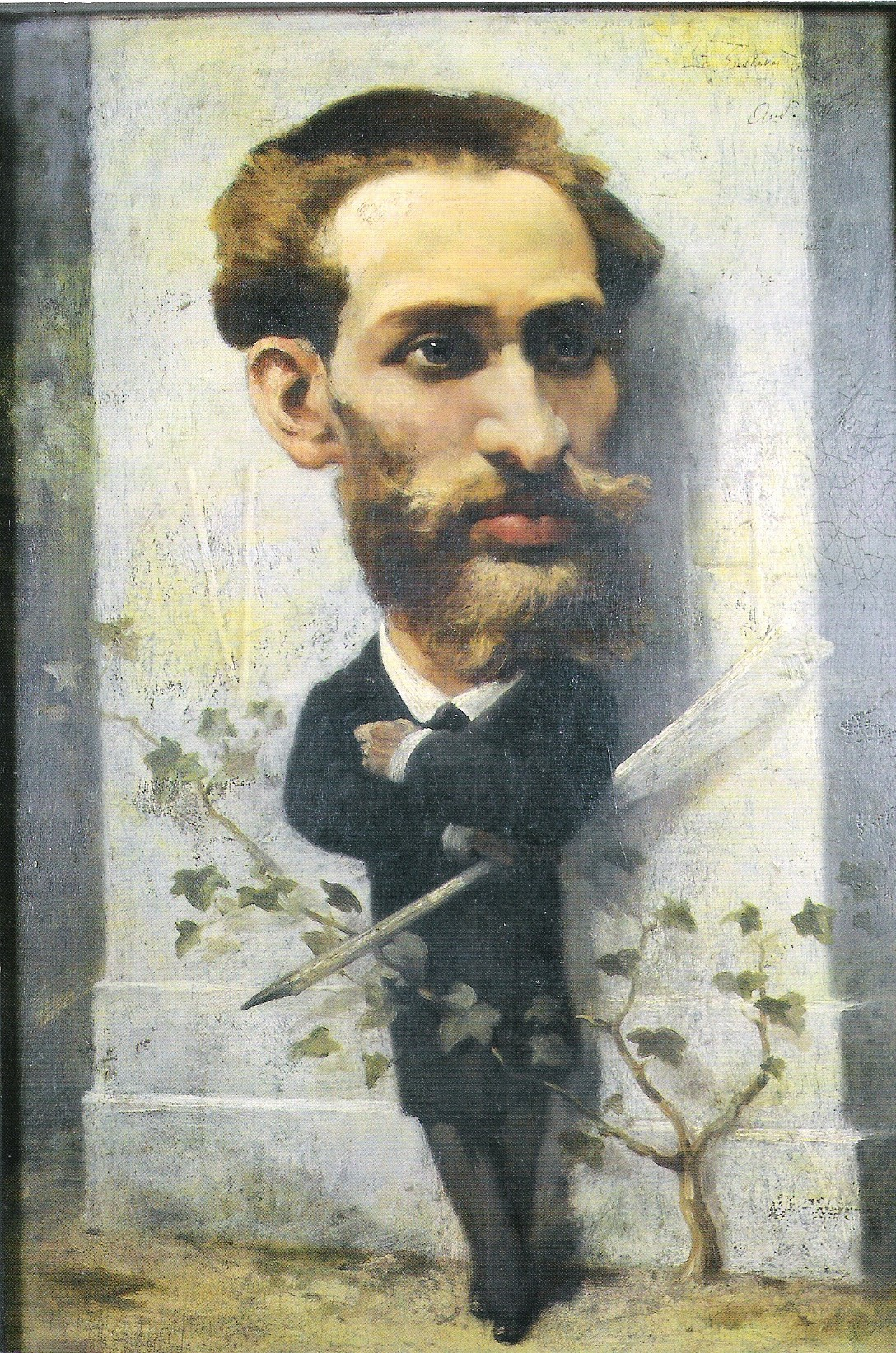 Gustave Rivet (1848-1936) caricaturé vers 1880 par Alain Gill.